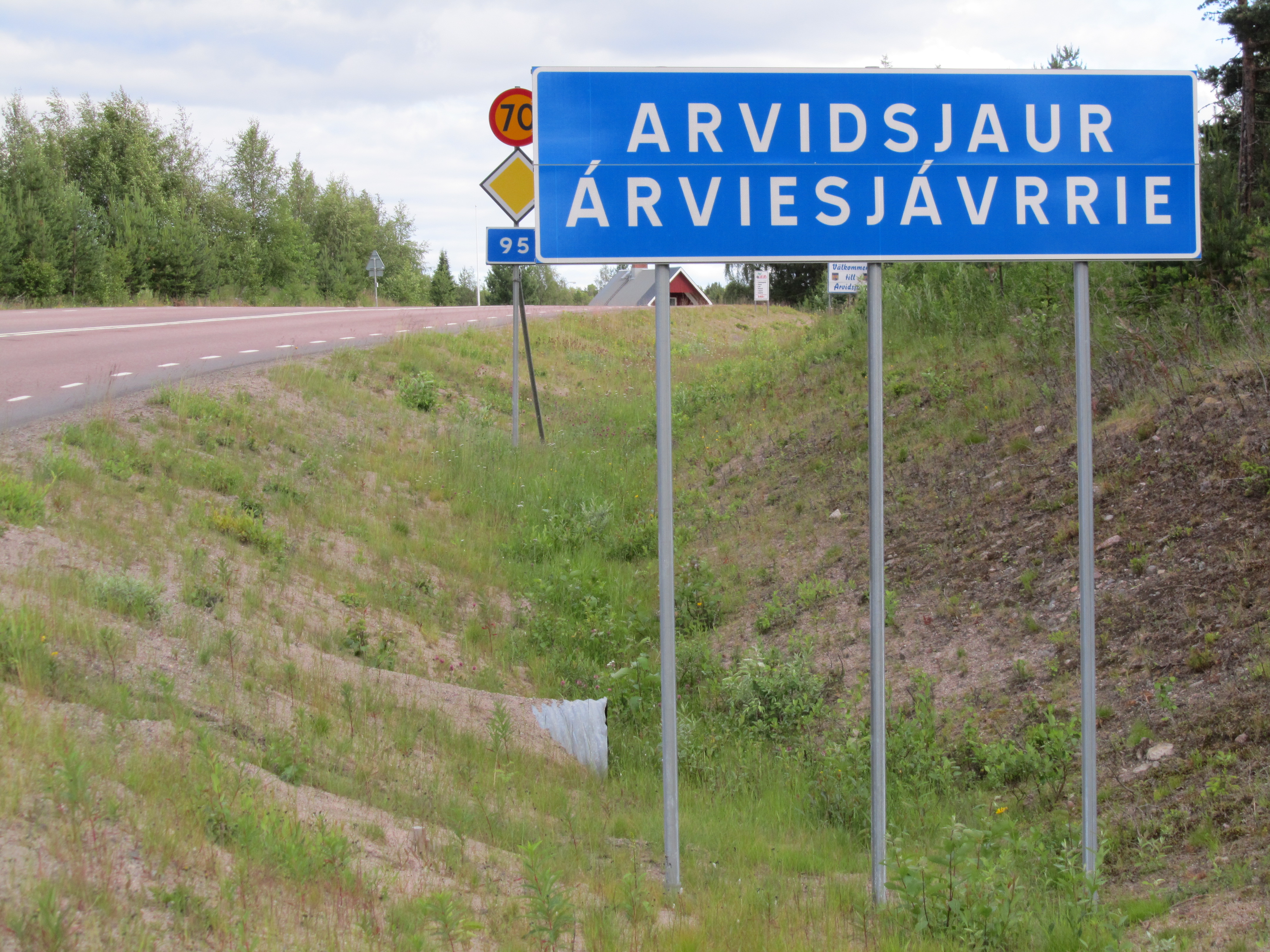 Ubmejesámiengiälla: Árviesjávrrie